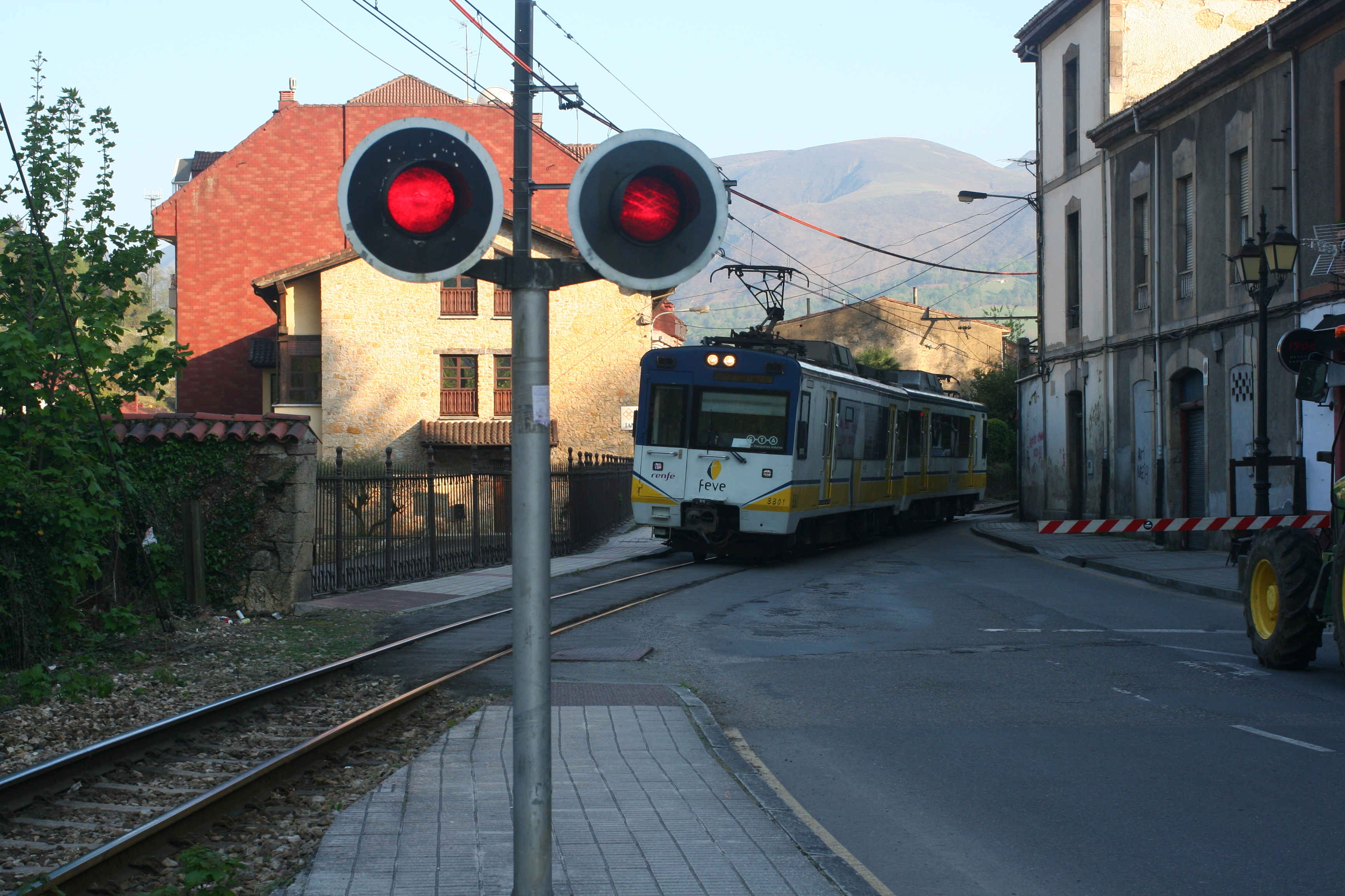 Una 3300 cruza el paso a nivel previo a la estación de Infiesto